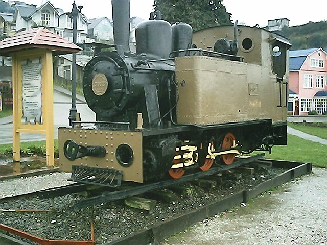 Locomotora del tren de trocha angosta del recorrido Ancud-Castro (1912-1960), en la Plaza del Tren, Castro, Chile.